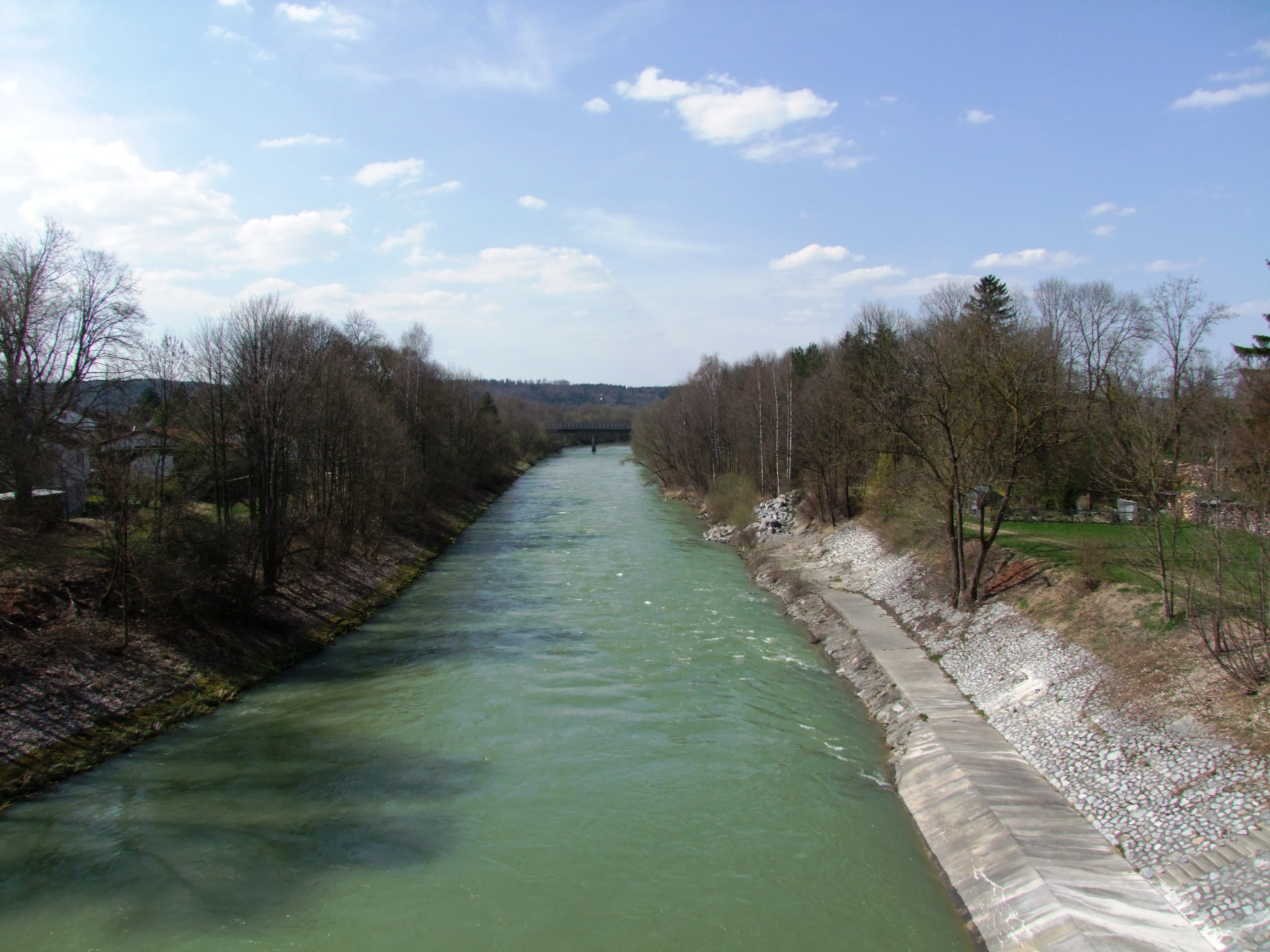 Die Iller an der Grenze Bayern (rechts) - Baden-Württemberg (links) bei Ferthofen von der Brücke beim Illerkraftwerk aus fotografiert.